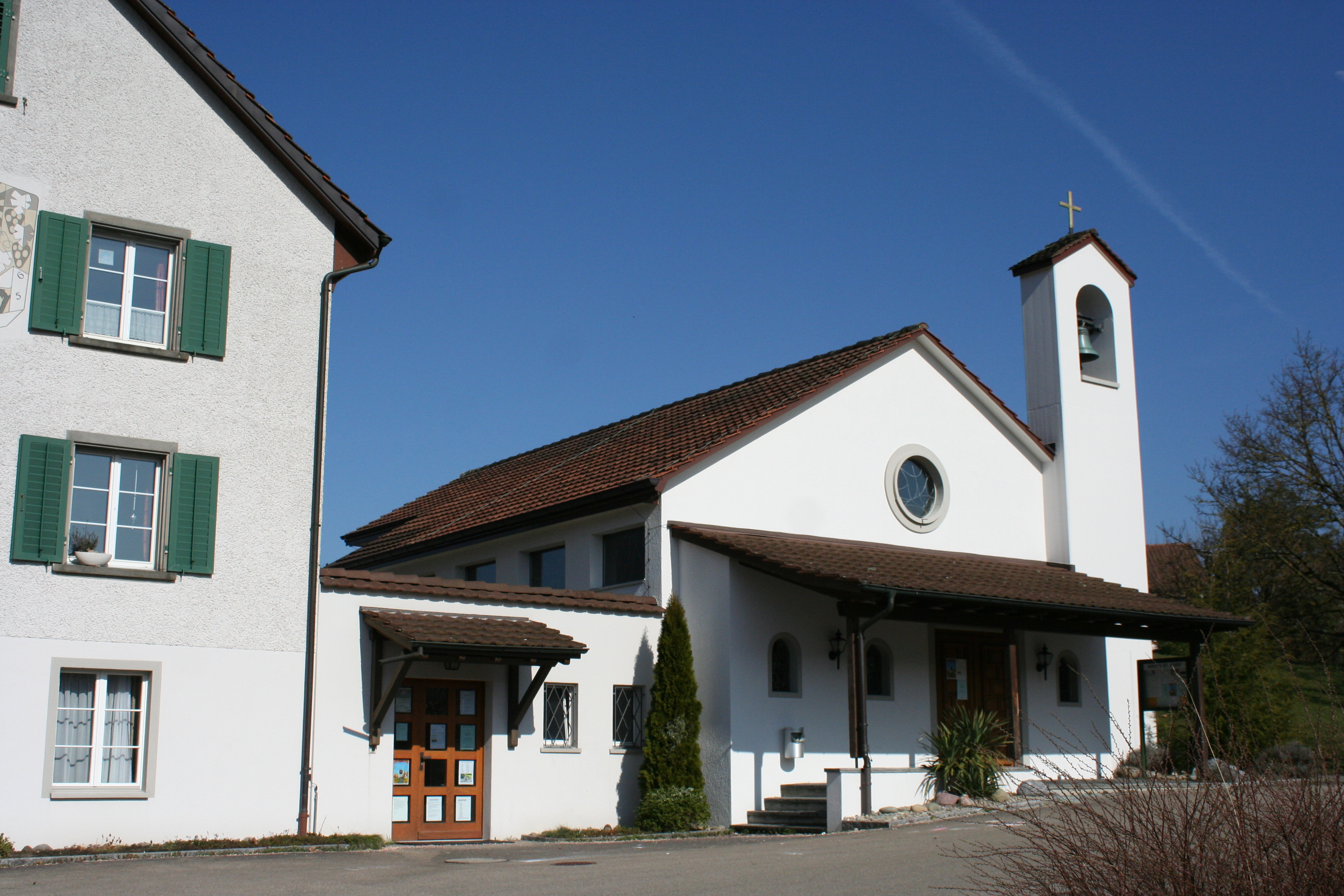 Römisch-katholische Kirche St. Josef Rickenbach-Sulz